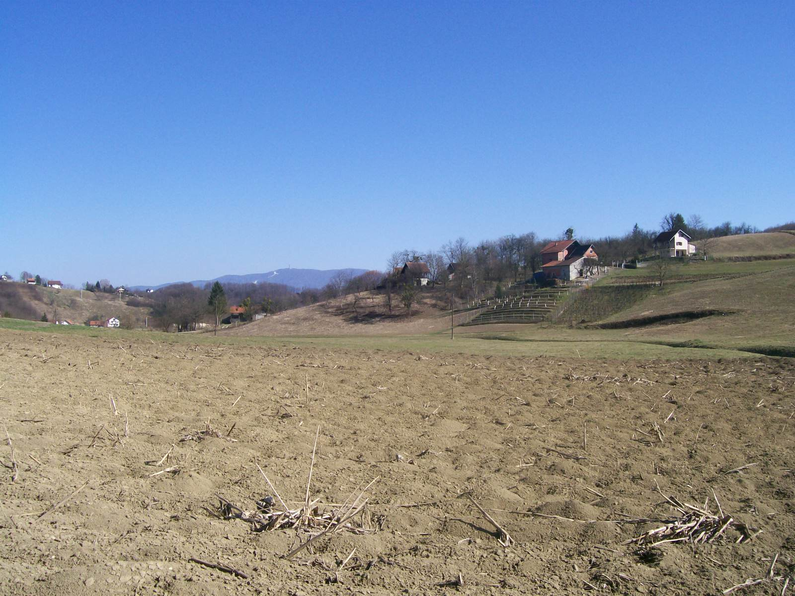 Pogled na Žlebec Pušćanski, općina Pušća (Zagrebačka županija). U pozadini se vidi Sljeme na Medvednici i skijaška staza